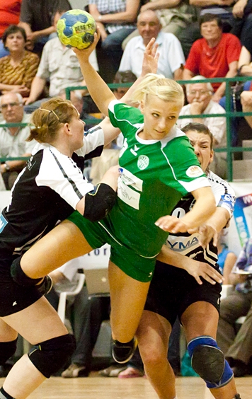 Krisztina Szádvári